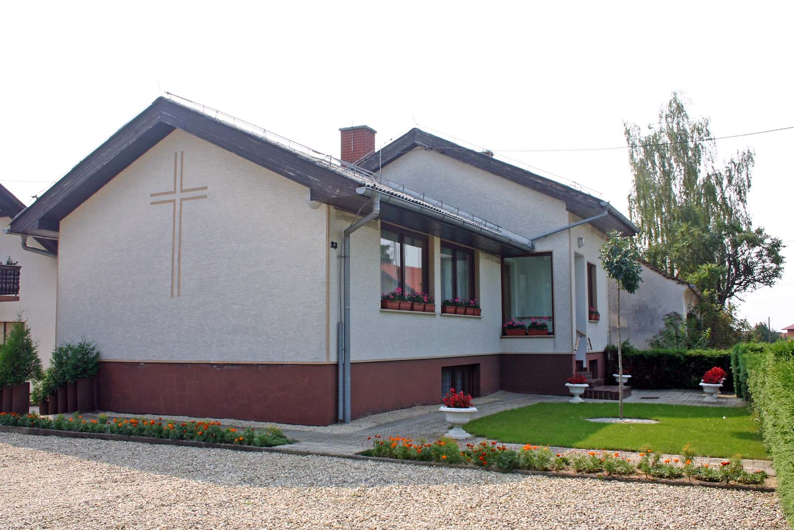 Binkoštna cerkev, Fokovci